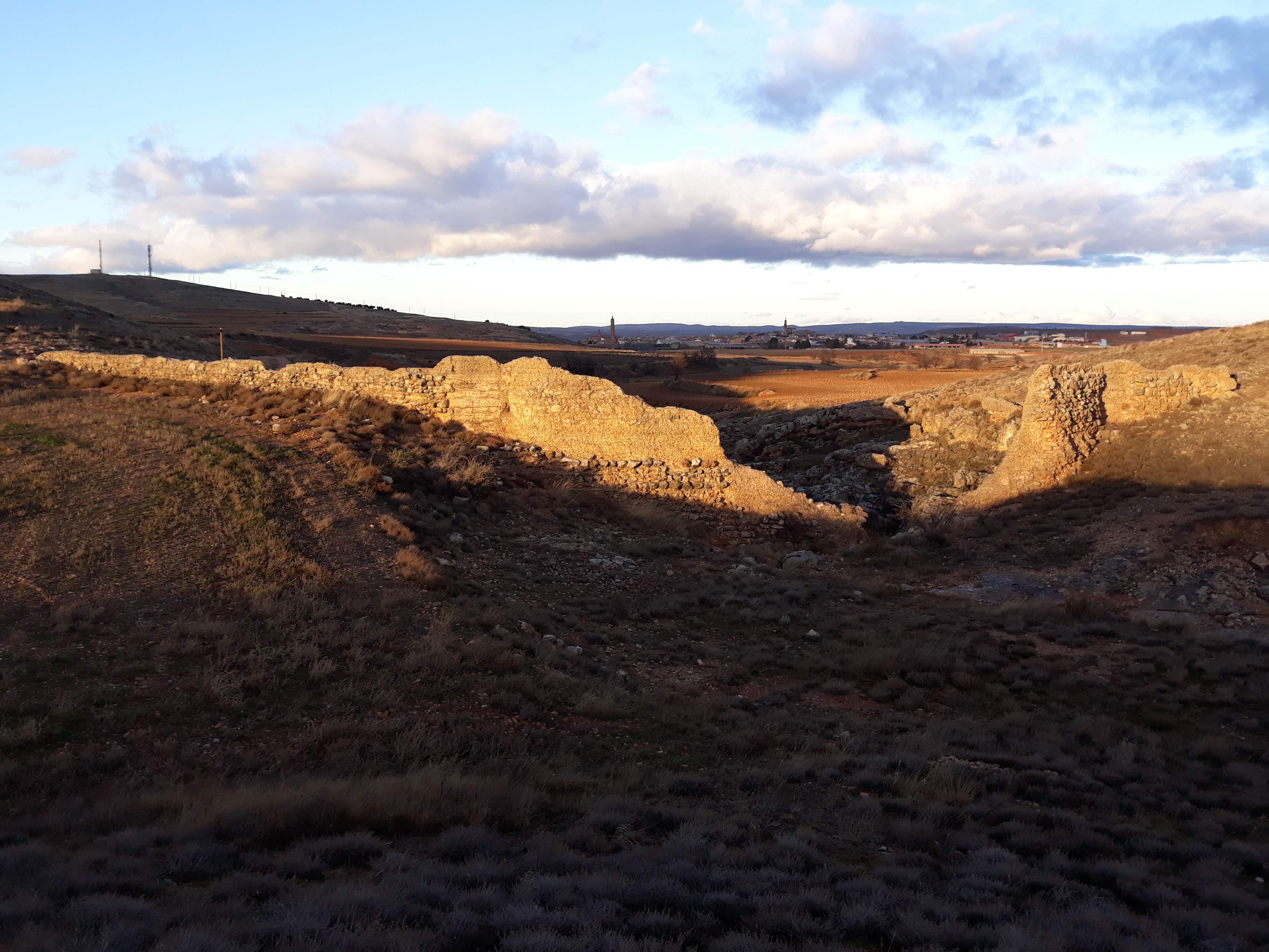 Panorámica aguas arriba de la Presa romana de Pared de los Moros al atardecer